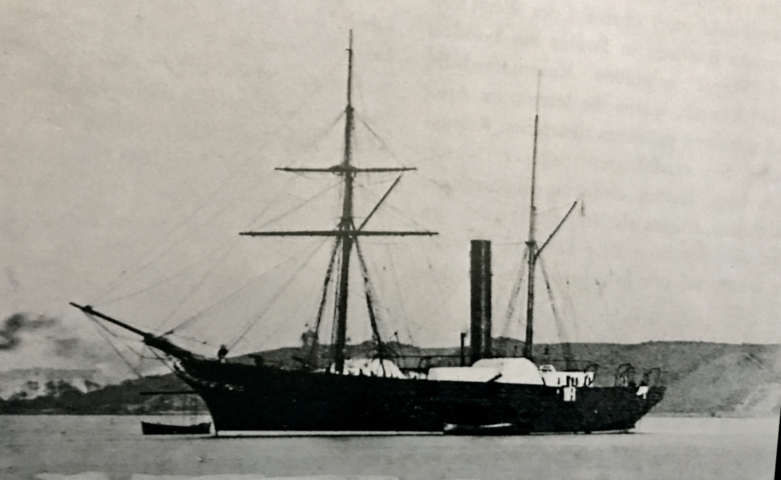 Radkorvette Preußischer Adler, Photographie ca. 1868